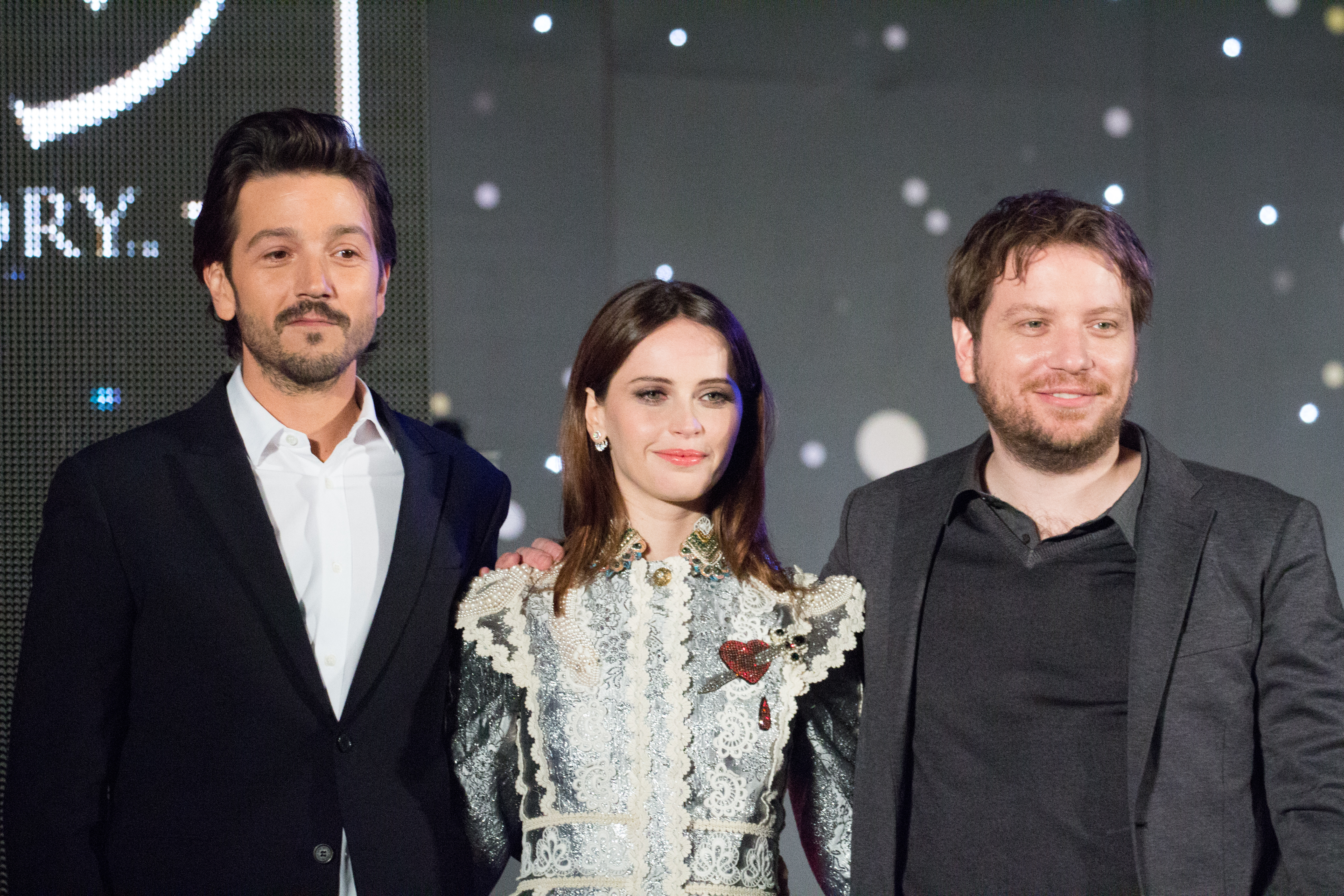 ローグ・ワン/スター・ウォーズ・ストーリー ジャパン・プレミア レッドカーペット ディエゴ・ルナ フェリシティ・ジョーンズ ギャレス・エドワーズ